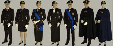 Uniformi da cerimonia dell'esercito italiano